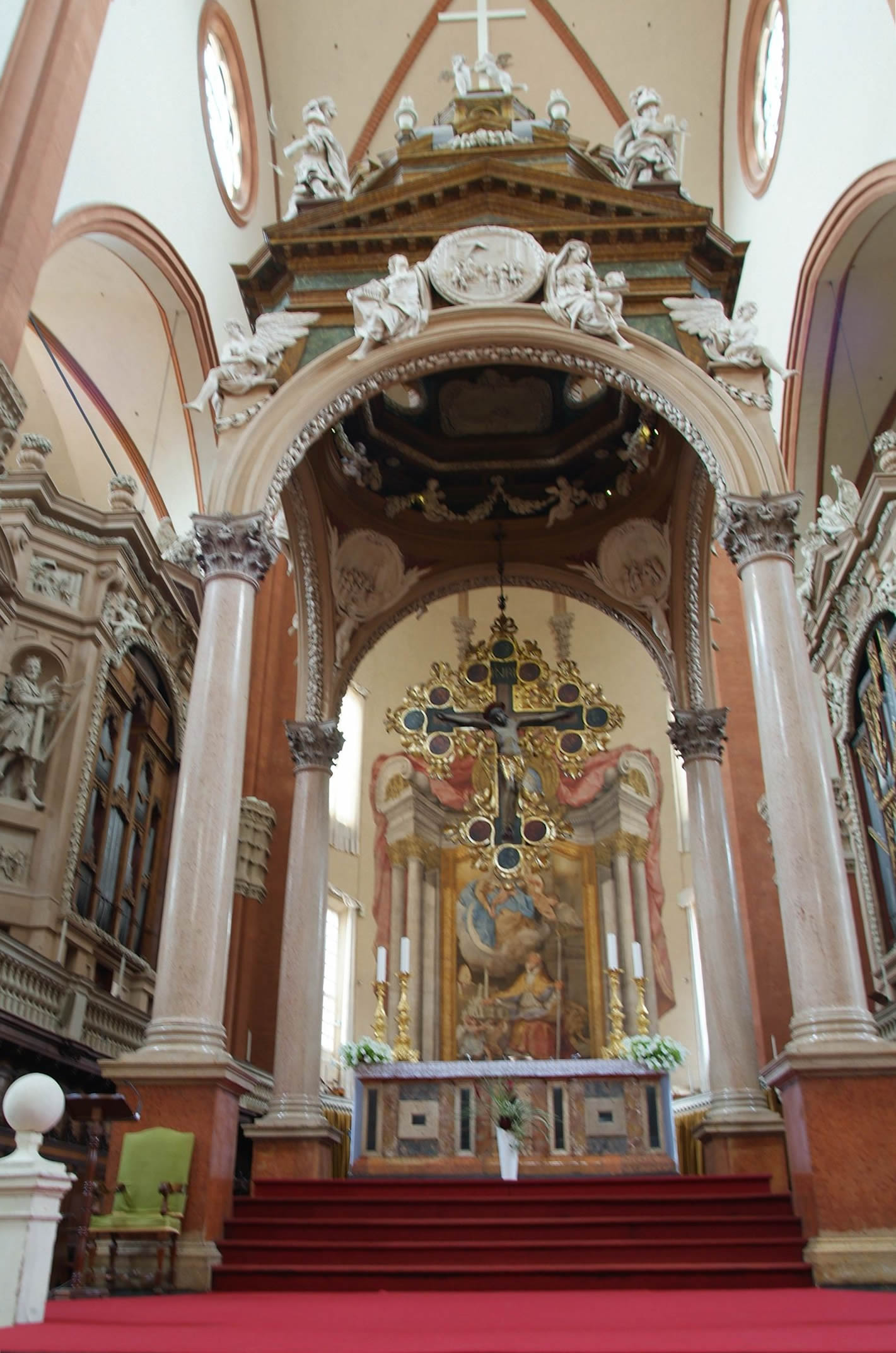 San Petronio